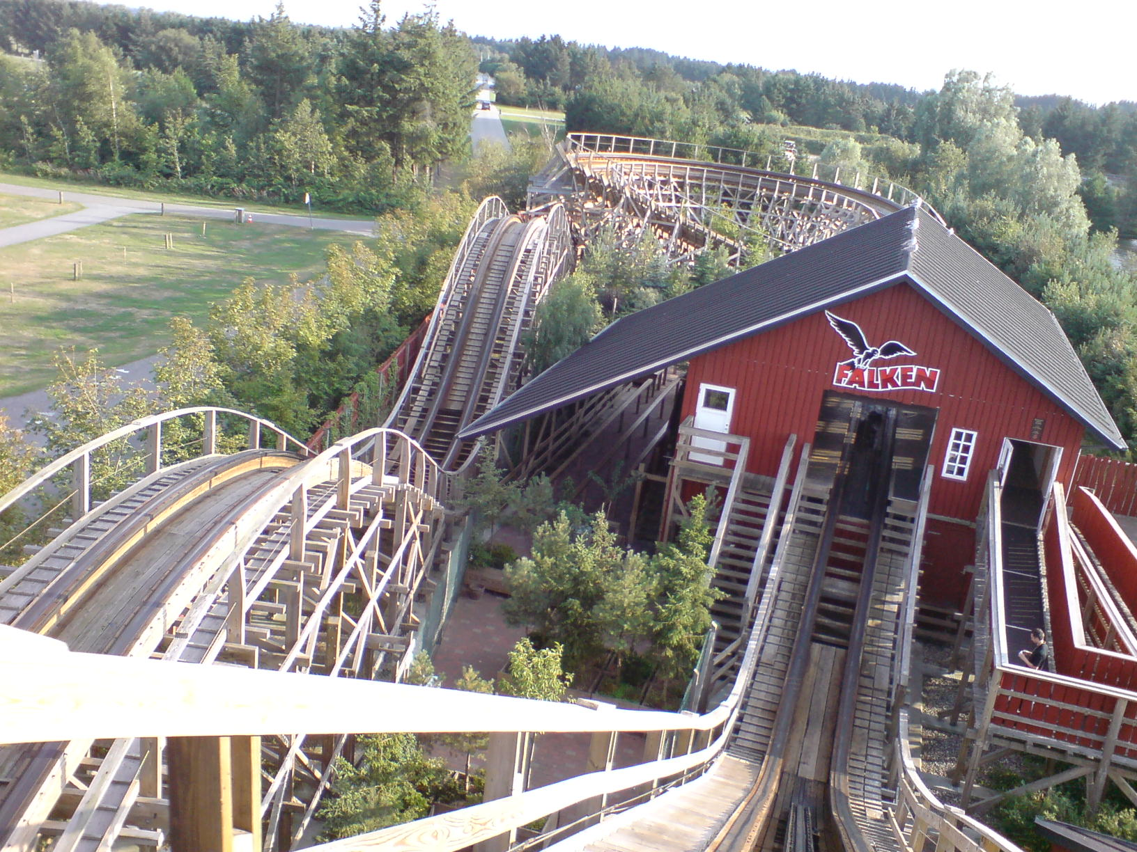 Falken vom Höchsten Berg rückwärts.